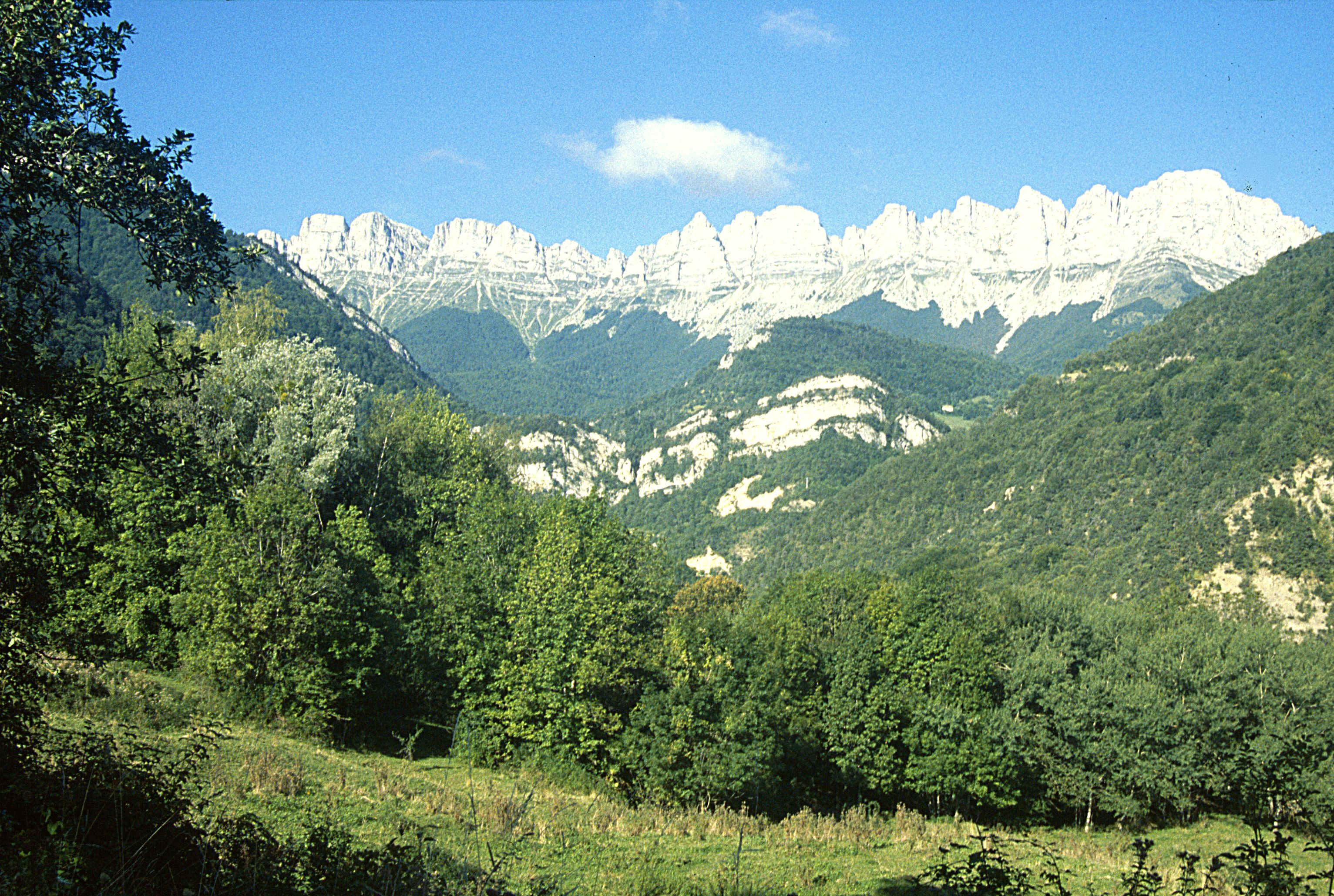 Vercors: Landschaft bei Corrençon